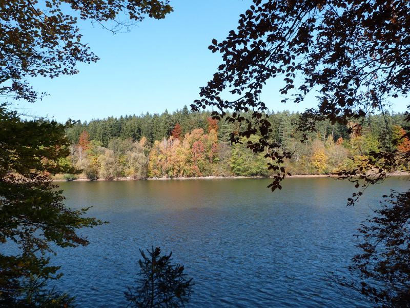 Orrotsee im Landschaftsschutzgebiet „Speicherbecken Orrot“ (LSG:BW-1.36.019)